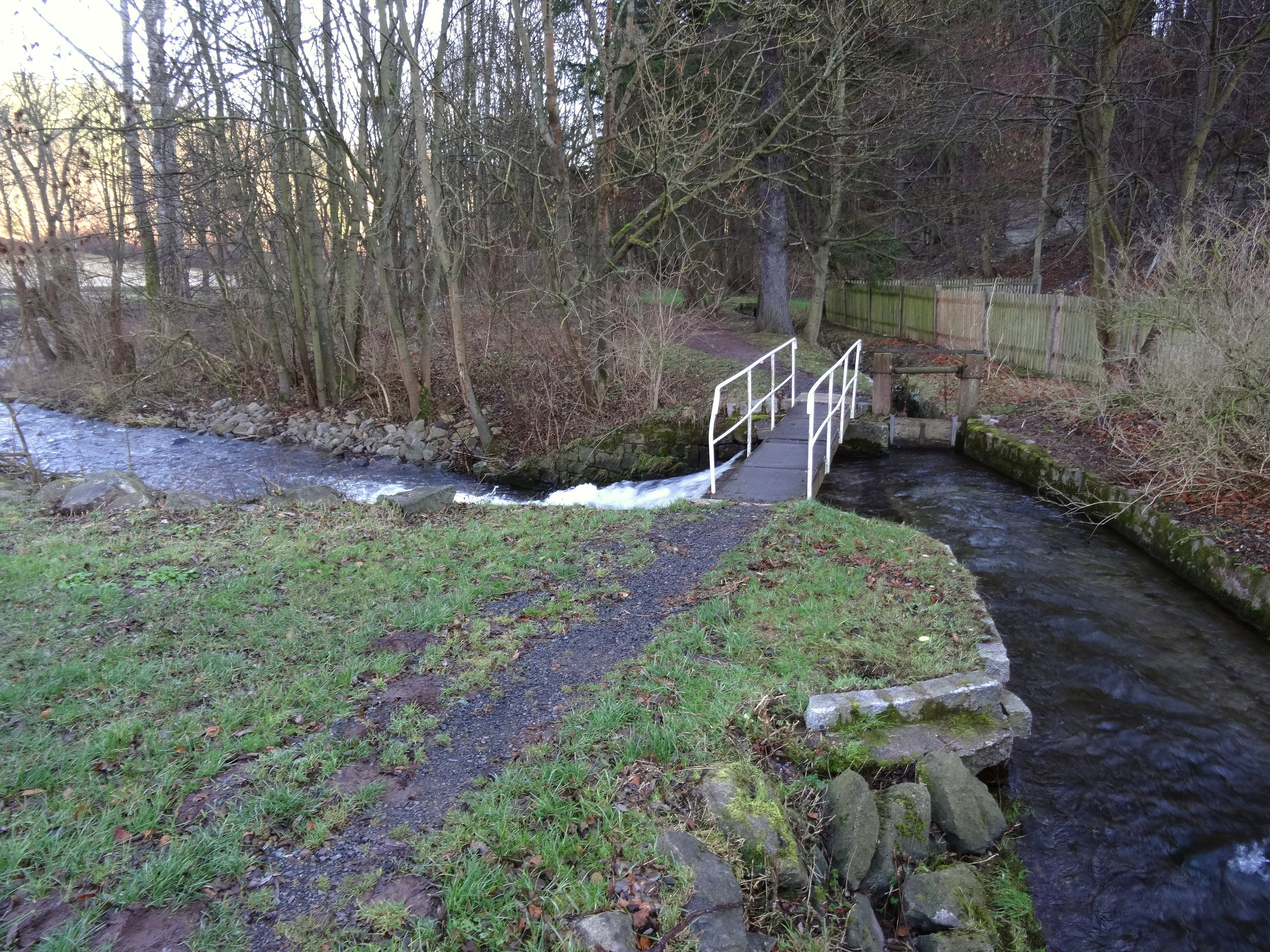 Von der Leina (im Vordergrund) wird der Kleine Leinakanal (geradeaus) zur Wasserversorgung für Gotha abgezweigt.